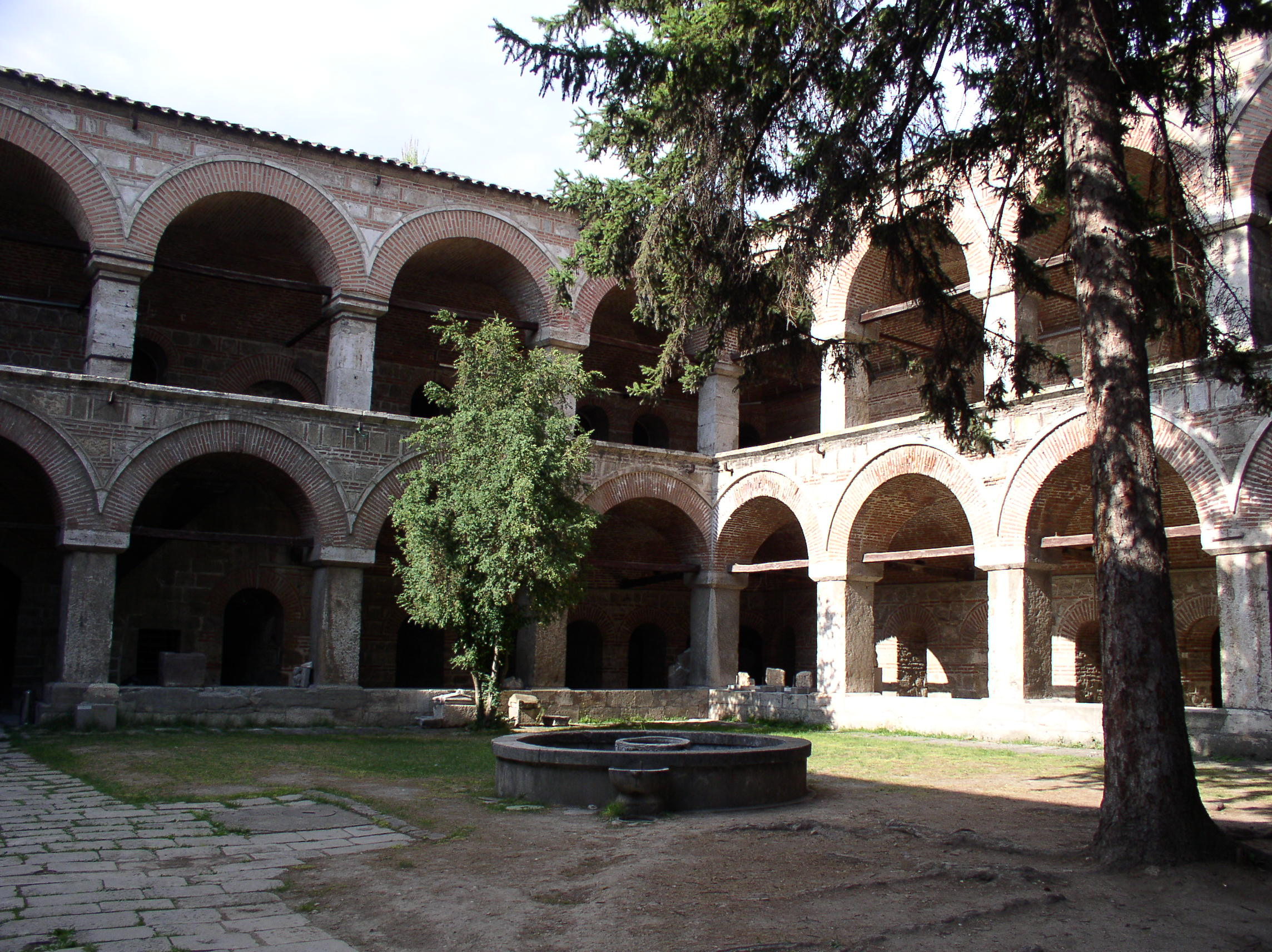 Куршумли хан у Старој скопској чаршији